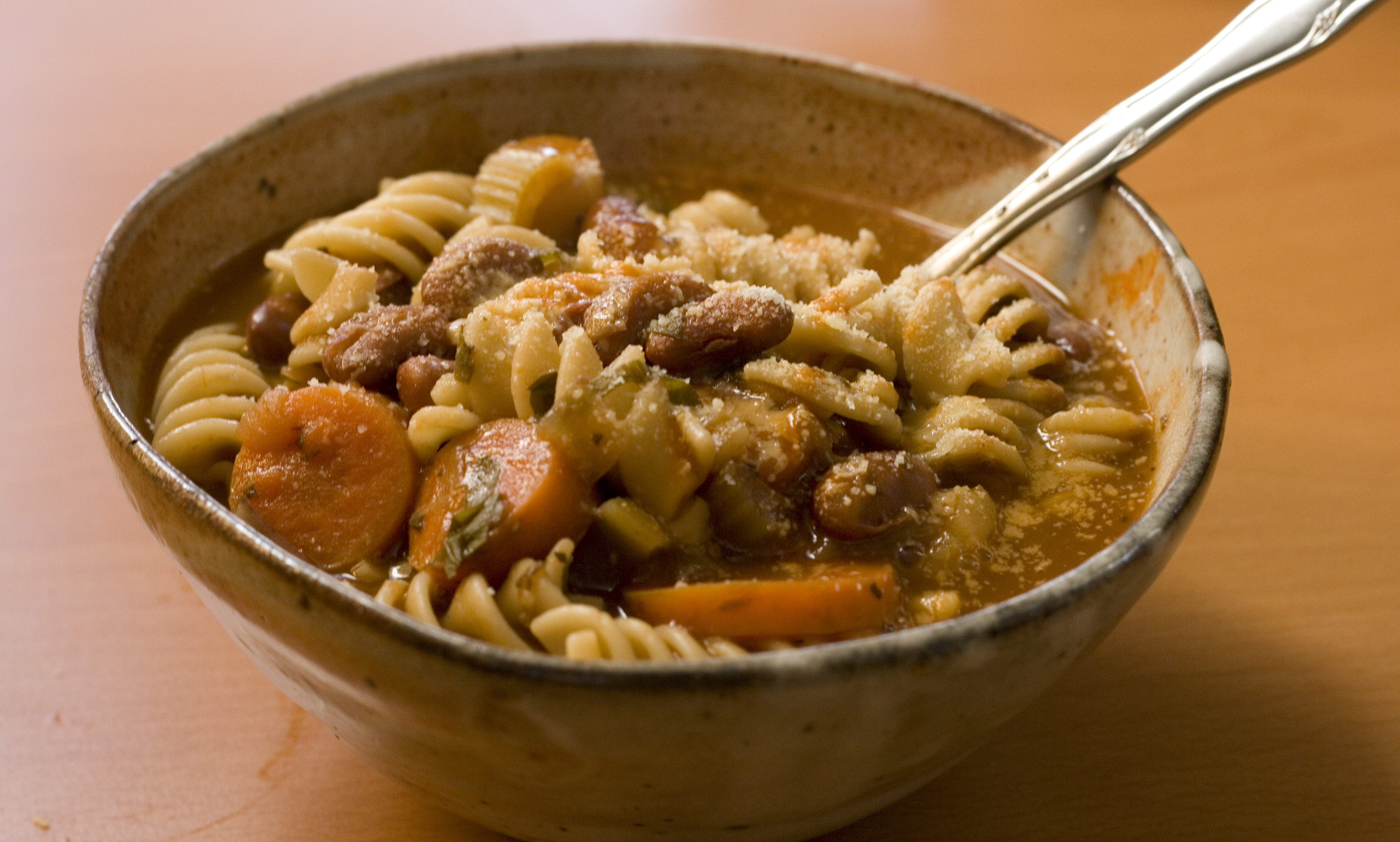 Minestrone soup